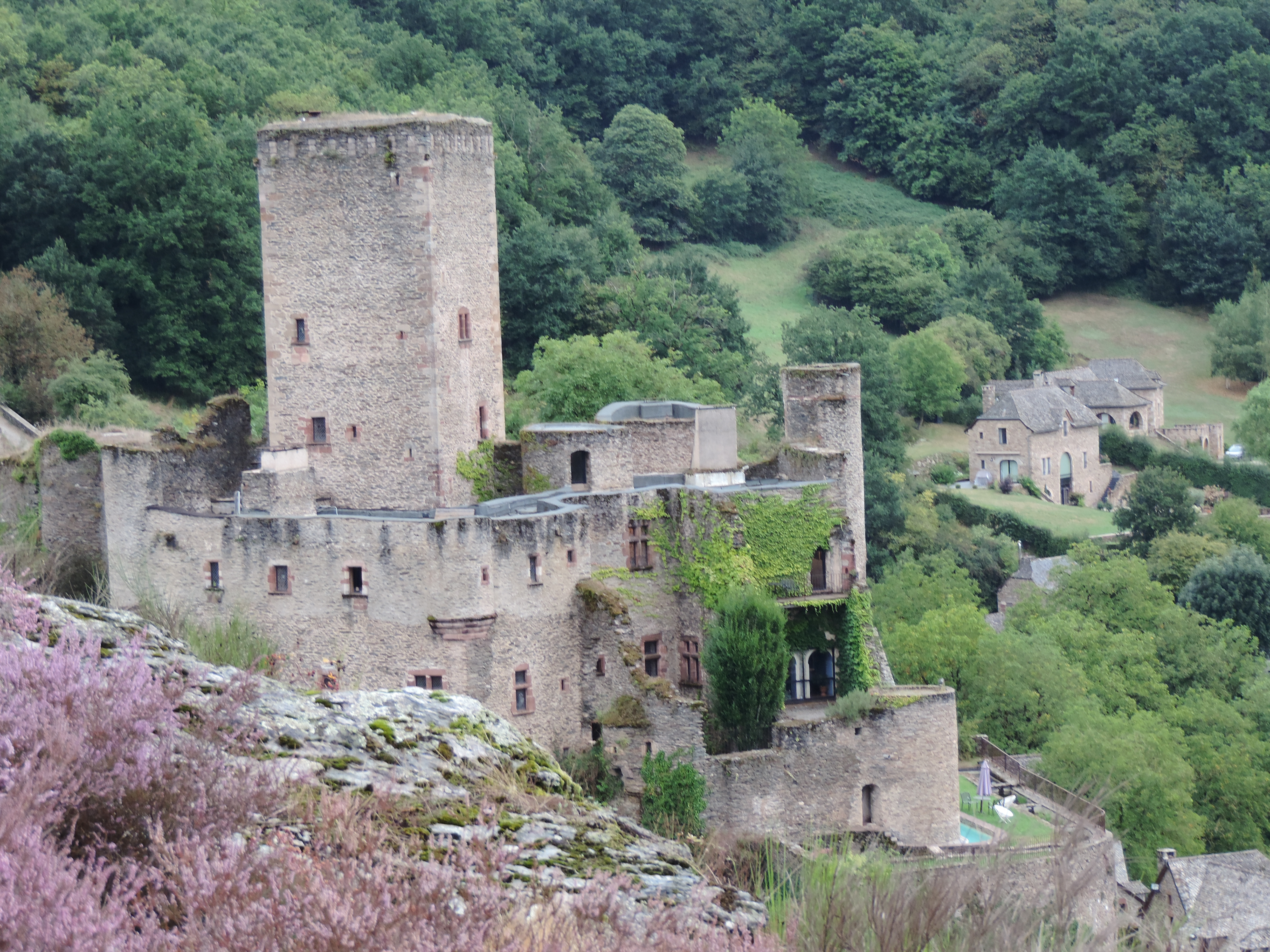 Château de Belcastel (Inscrit) .